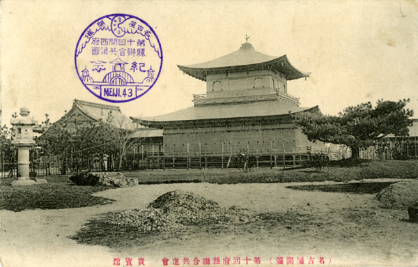 1910年に鶴舞公園で開催された「第10回関西府県連合共進会」。聞天閣とも呼ばれた貴賓館。